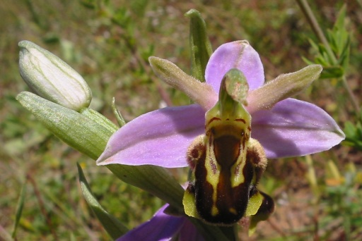 Ophrys apifera lusus aurita, le 6 juin 2004, Essonne